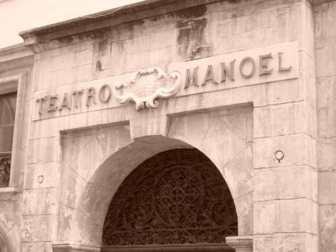 תיאטרון מנואל